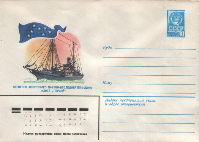 Художественный маркированный конверт (ХМК) Министерства связи СССР. Первенец русского научно-исследовательского флота «Персей». Выпущен 11 мая 1979 года. Художник Ю. Левиновский. Тираж — 5 миллионов. Номинал — 4 копейки. Источник описания: журнал «Филателия СССР», №11, 1979 год, стр. 31. Номер конверта по каталогу — 13512.